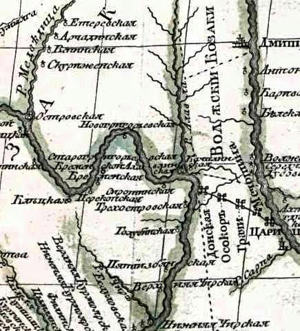 Сиротинская на карте Самуила Готлиба Гмелина, рус. вариант, 1769 год (фрагмент)